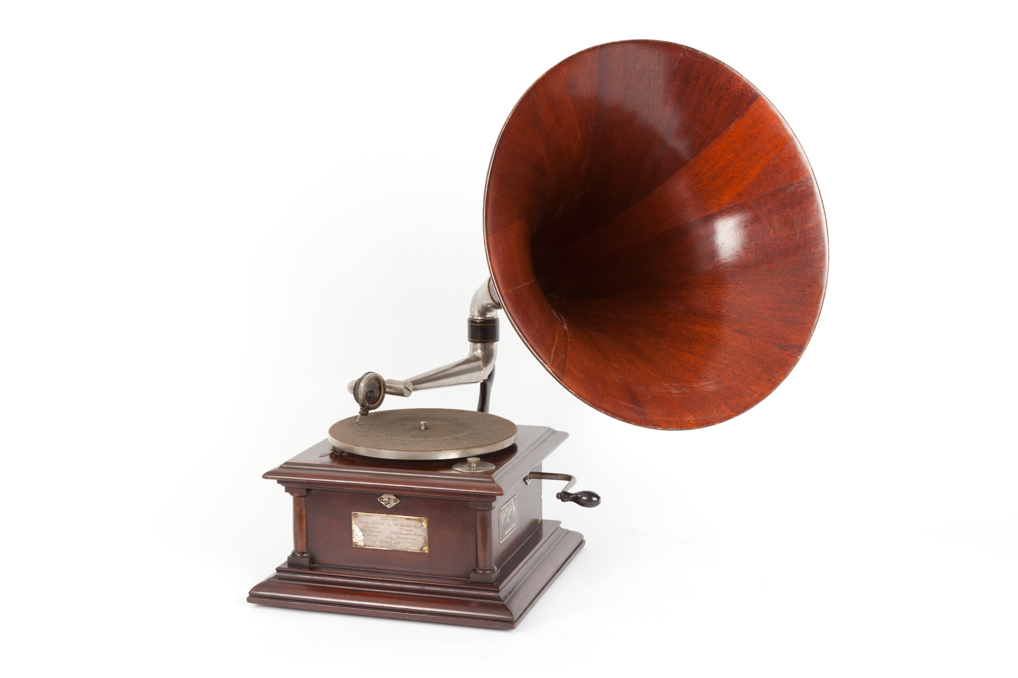 Grammofono costituito da un mobiletto ospitante il piatto e da una tromba entrambe in mogano. All'interno del mobile, l'apparecchio è provvisto di un doppio motore a molla, azionato dalla manovella posta sul fianco destro della base. Il piatto è situato sul piano superiore del mobiletto ed è rivestito da feltro di colore grigio. Il diaframma è sostenuto dal braccio, al quale è connesso attraverso un perno a collo d'oca. Il braccio, sostenuto da un supporto posteriore in ghisa, è costituito da un tubo a gomito in metallo, sul quale è innestata la tromba in mogano. Nell'angolo anteriore destro del piano è situata la manopola del controllo della velocità di rotazione. Conservato presso il Museo Nazionale della Scienza e della Tecnologia Leonardo da Vinci di Milano